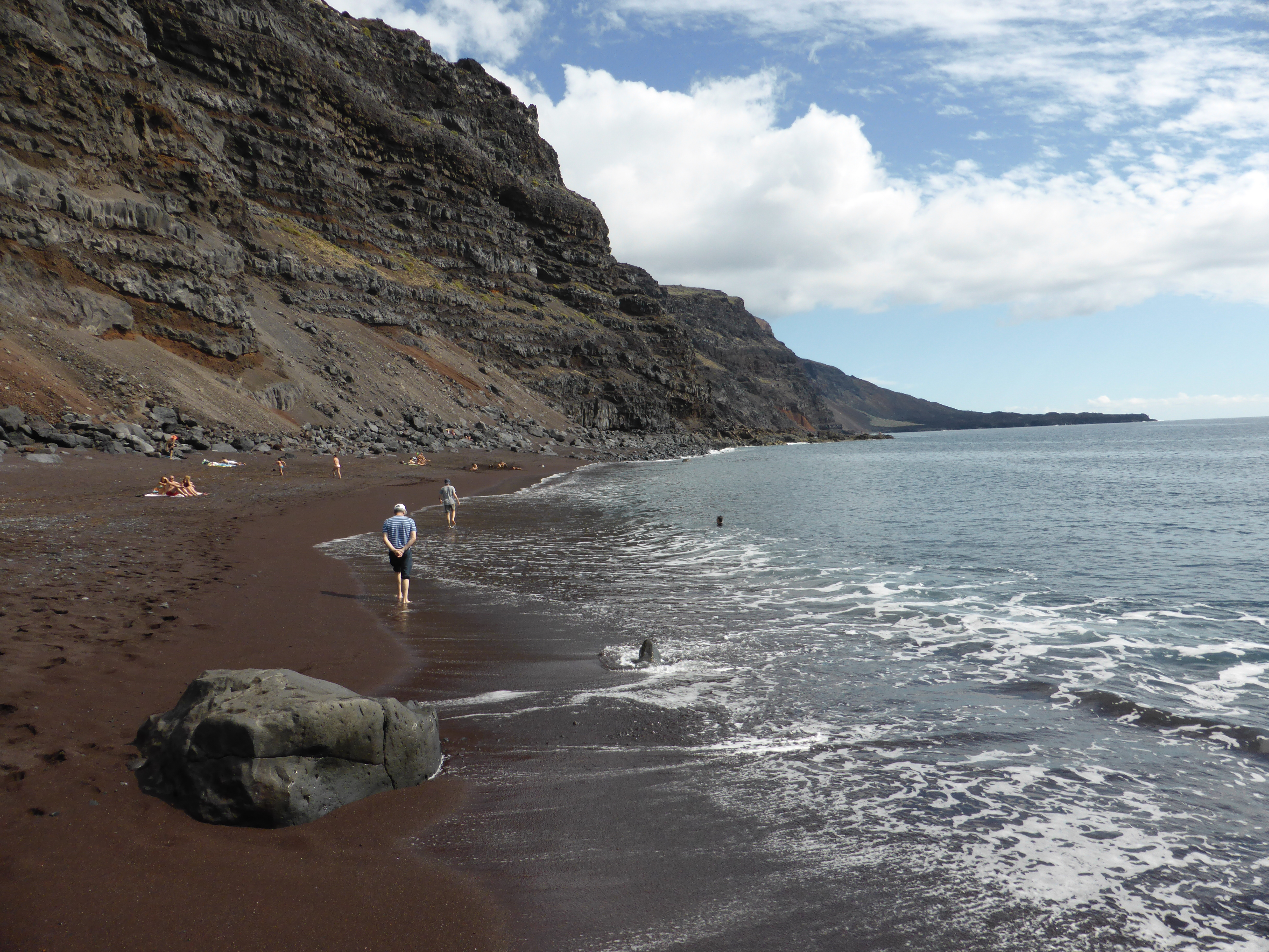 Playa del Verodal (o playa de El Verodal), de arena rojiza, en el oeste de la isla de El Hierro, en un día de mar tranquilo. Hay que tener cuidado con las corrientes y es peligrosa los días de mar bravo.